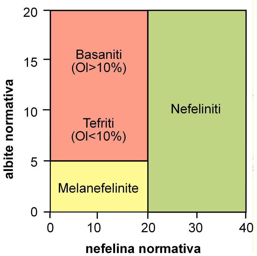 Nomenclatura delle rocce nefelinitiche in base al rapporto tra % di nefelina normativa e % di albite normativa (Le Bas, 1989).